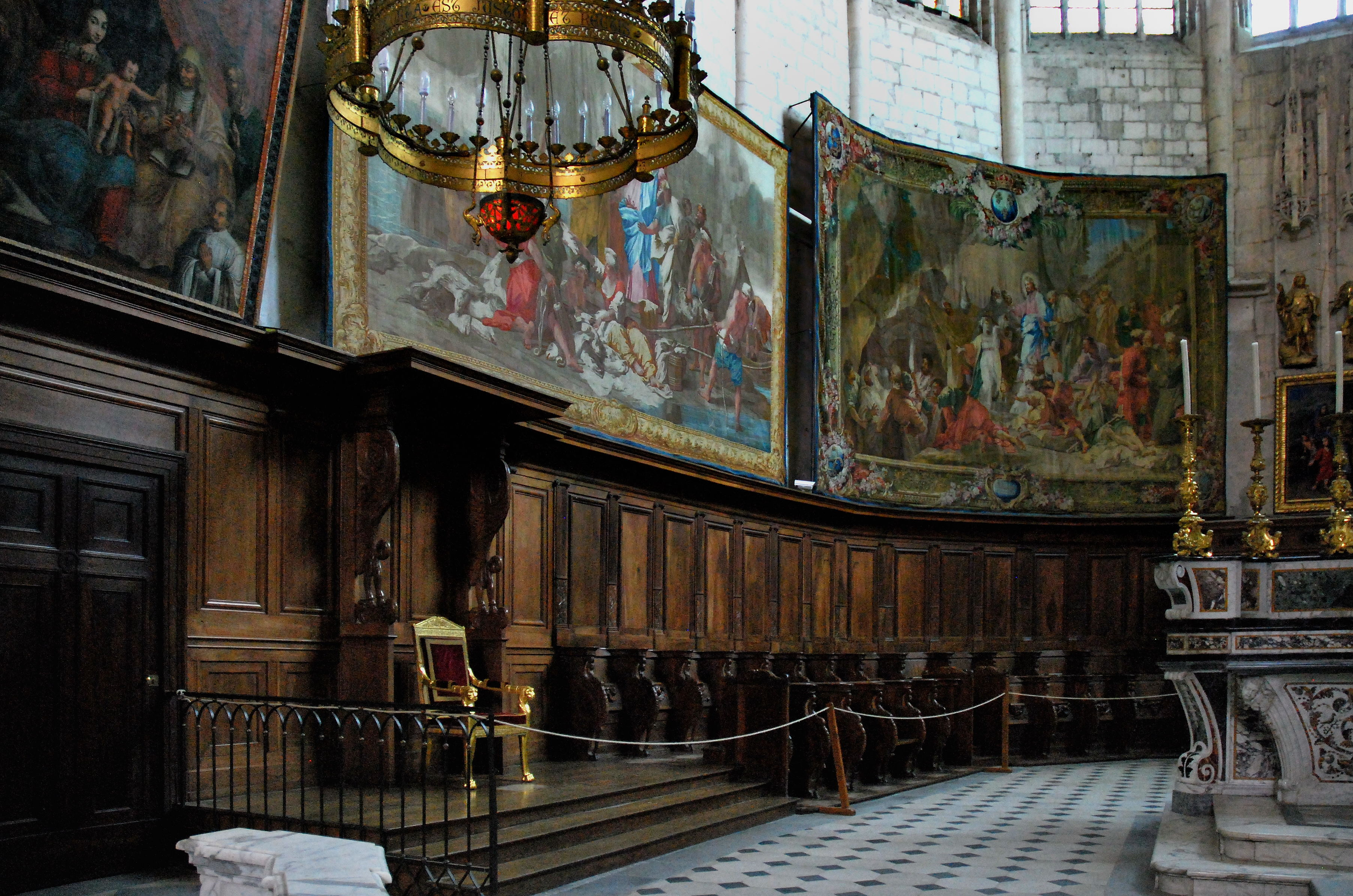 Cathédrale Saint-Vincent in Viviers; Bischofstuhl im Chor